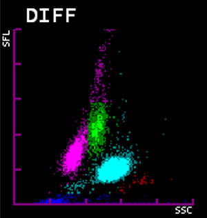 Grafico de dispersión (dispersograma o scatergrama) de un citómetro de flujo sencillo utilizado en hematología. Grafica SFL (fluorescencia del núcleo) vs SSC (complejidad citoplasmática). En magenta se observan los linfocitos, en verde monocitos en cian neutrófilos, en rojo eosinófilos y abajo a la izquierda en azul plaquetas.